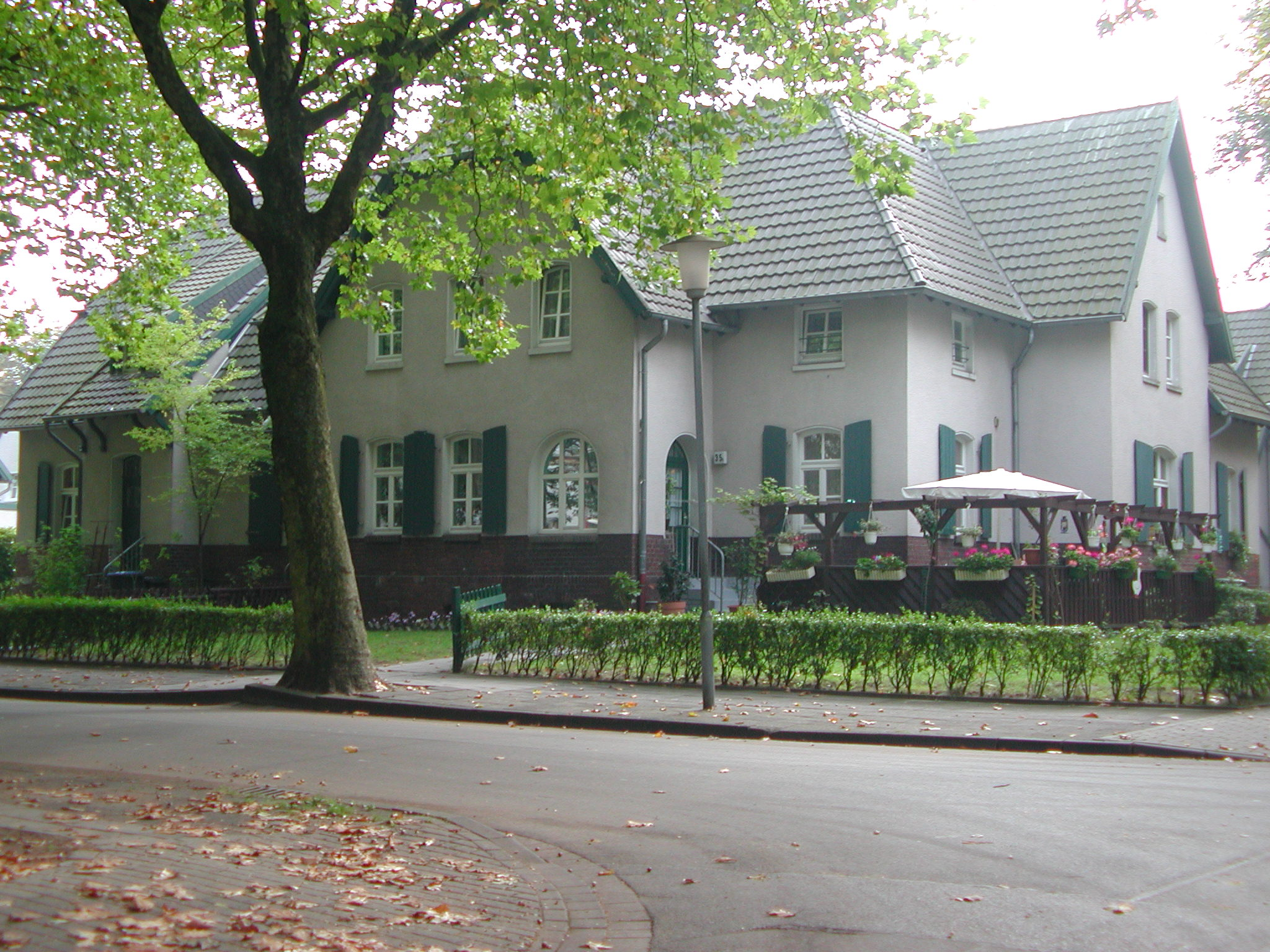 Bergarbeitersiedlung Moers-Meerbeck